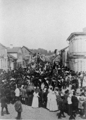 IV üldlaulupeo rongkäik Tartus Treffneri gümnaasiumi juures 15.-17.06.1891